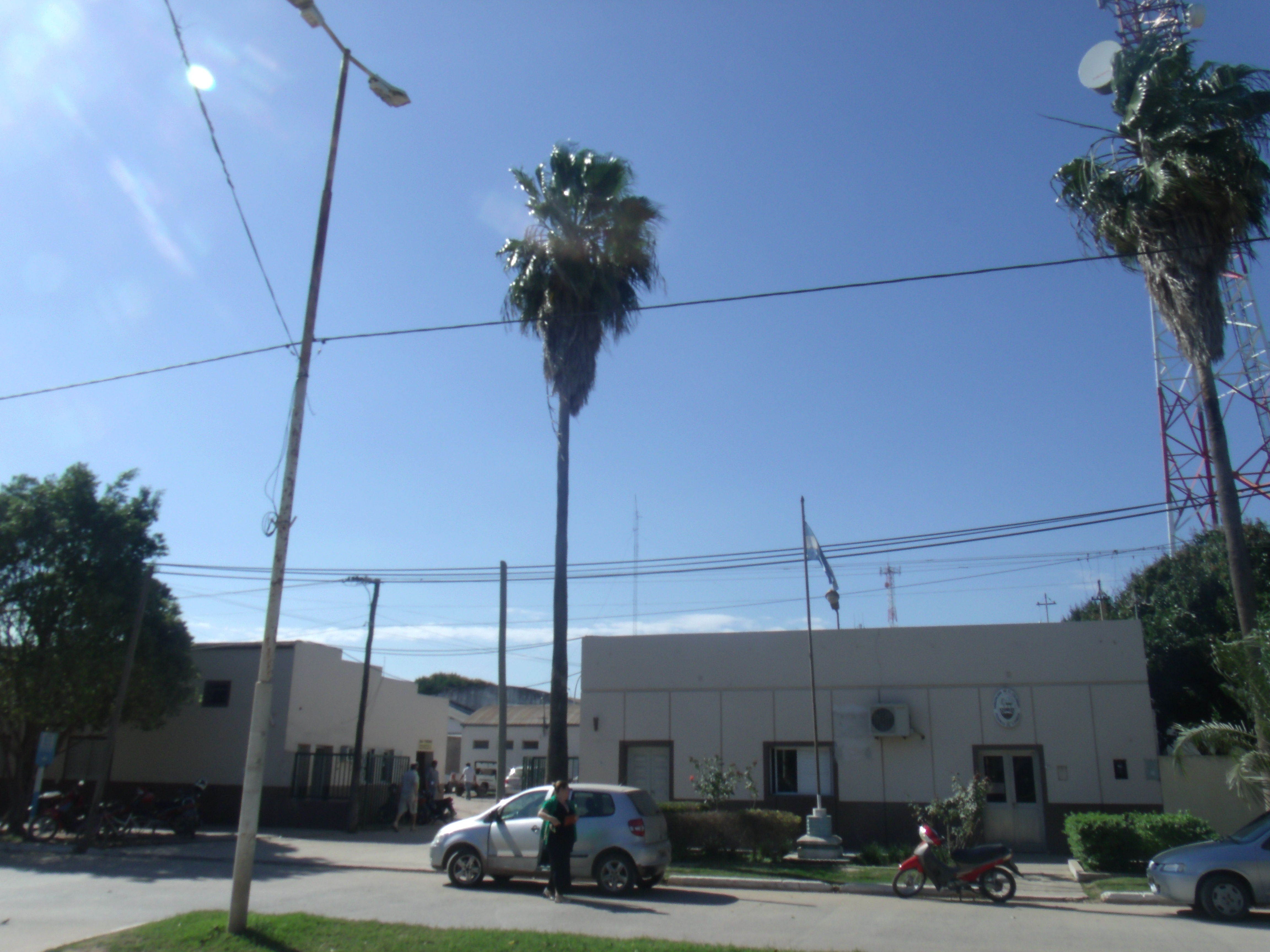 Sede de la Municipalidad de El Colorado, Formosa